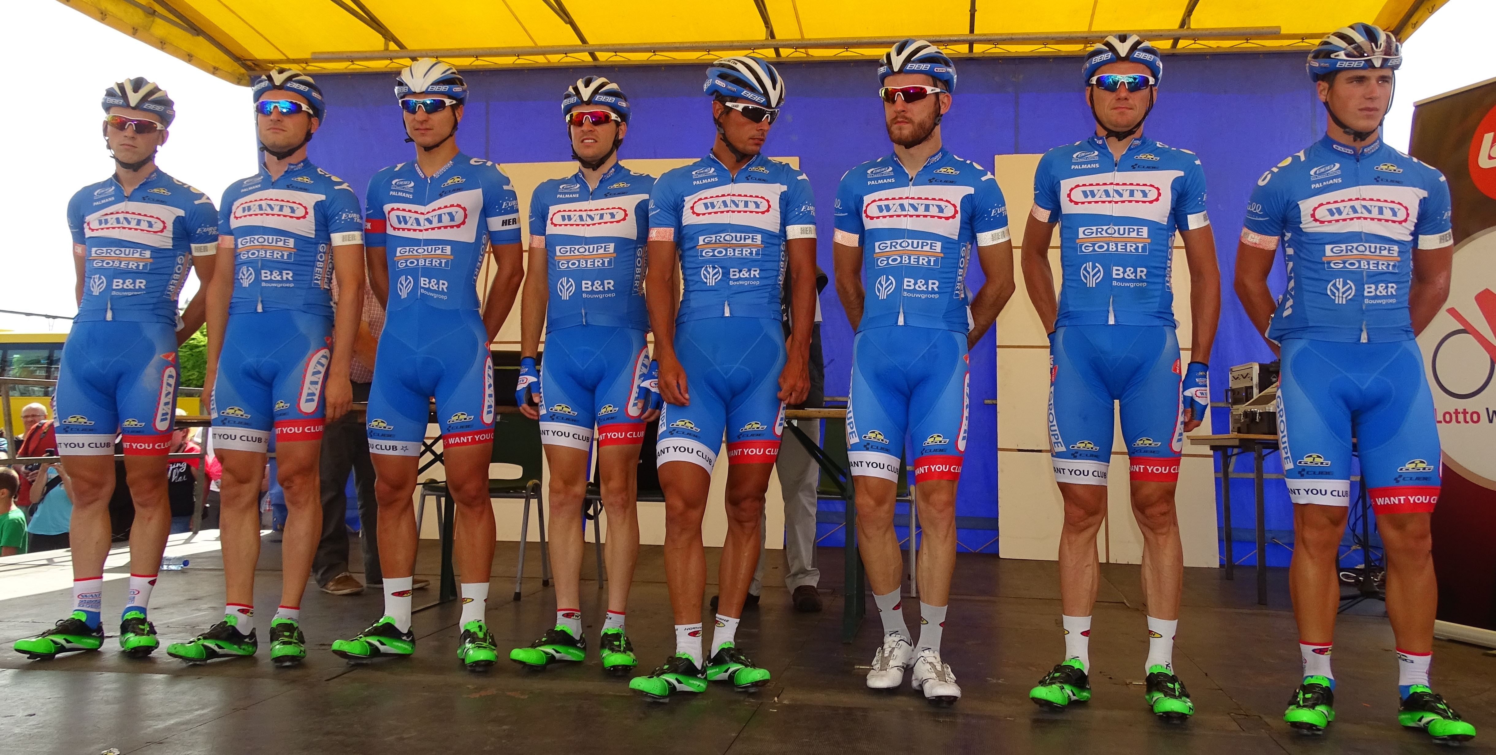 Reportage réalisé le mercredi 22 juillet à l'occasion du départ du Grand Prix Pino Cerami 2015 à Saint-Ghislain, Belgique.